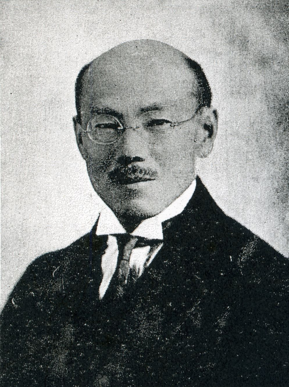 この写真は、小坂順造（1881-1960）の写真です。